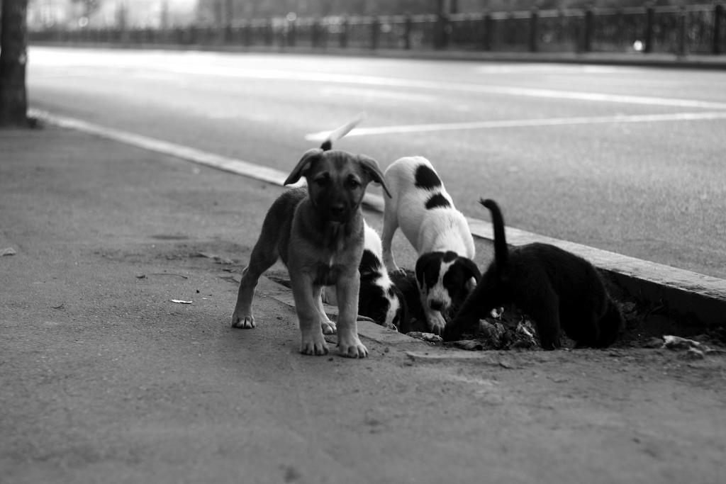 Feral puppies in Bucuresti.